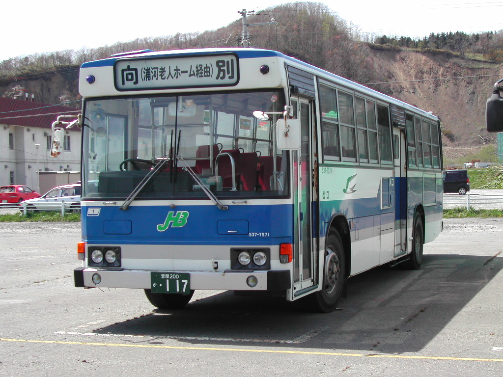 様似営業所にて、許可を得て撮影